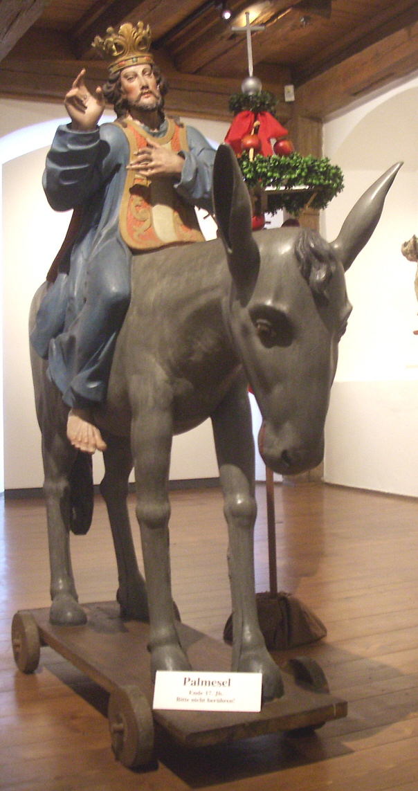 So genannte „Palmesel“ wurden an Palmsonntagsprozessionen mitgeführt und mit „Palmen“ gegrüßt.